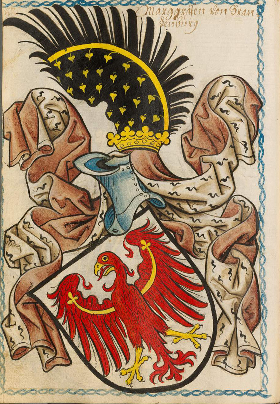 Scheibler'sches Wappenbuch , älterer Teil Markgrafen von Brandenburg